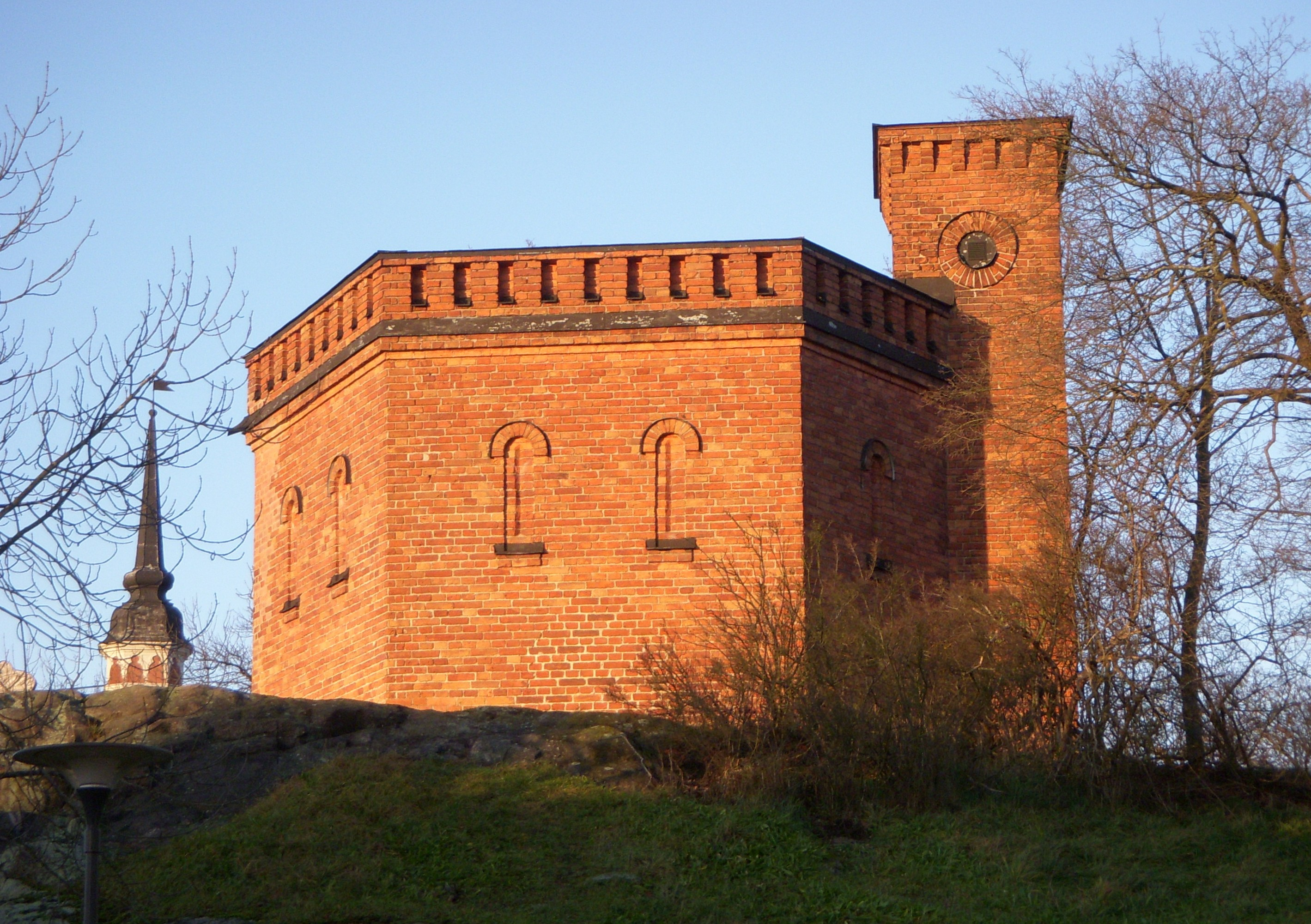 Skeppsholmens vattentorn